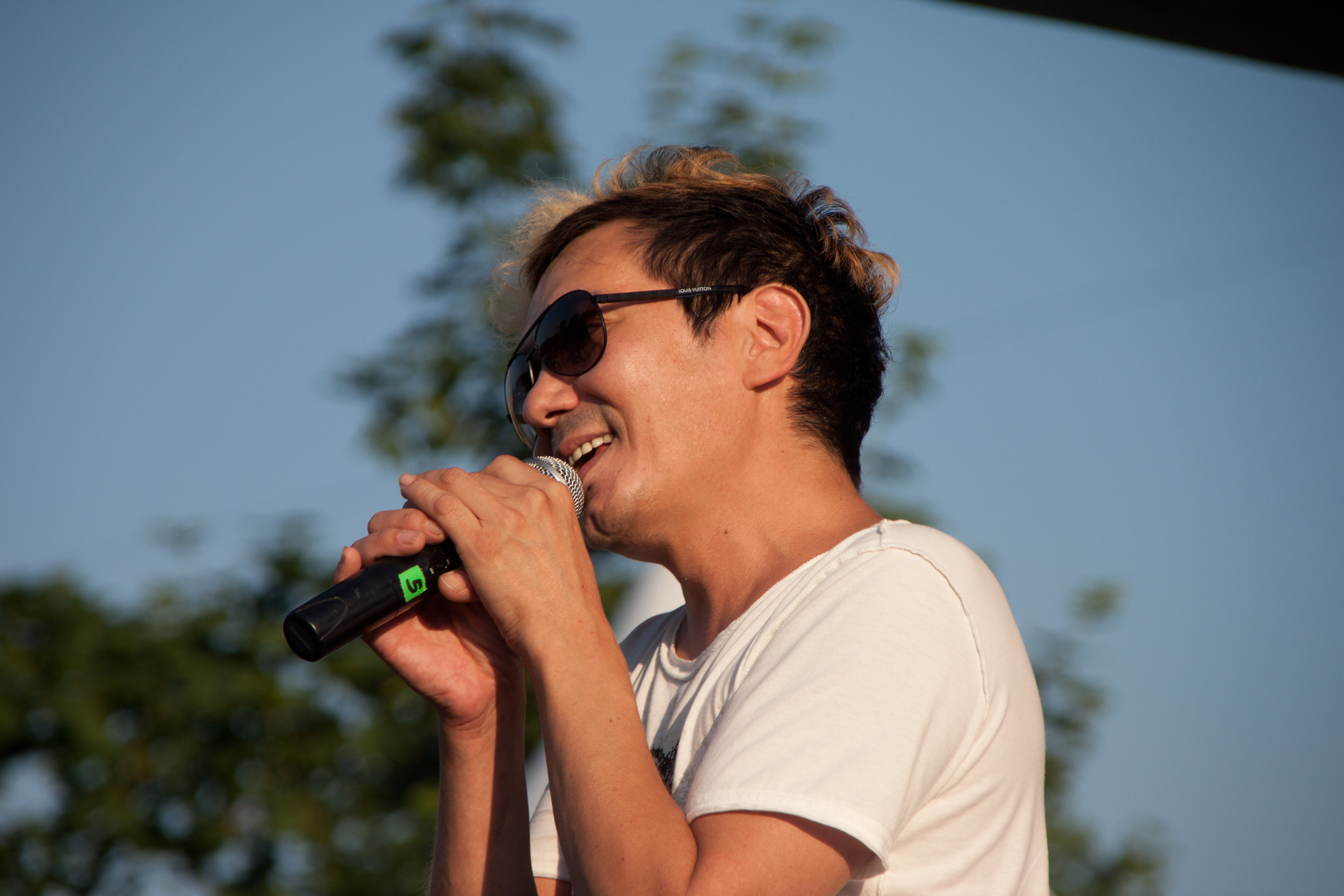 Экс-солист группы "Иванушки International" Олег Яковлев на празднике "Лучший город Земли" в р-не Гольяново (Москва)